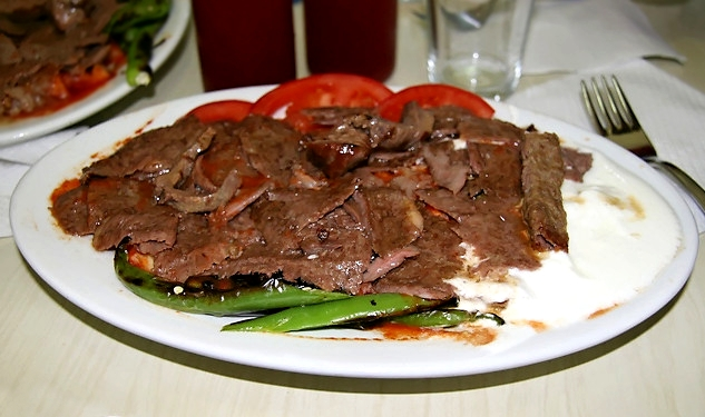 Picture taken in Bursa, in the restaurant Kebabçı İskender oğlu Cevat, by Lakerda.